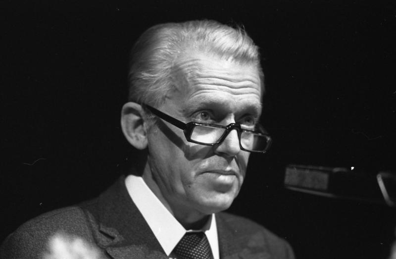 Grüne Woche Berlin- Eröffnungsveranstaltung im ICC.